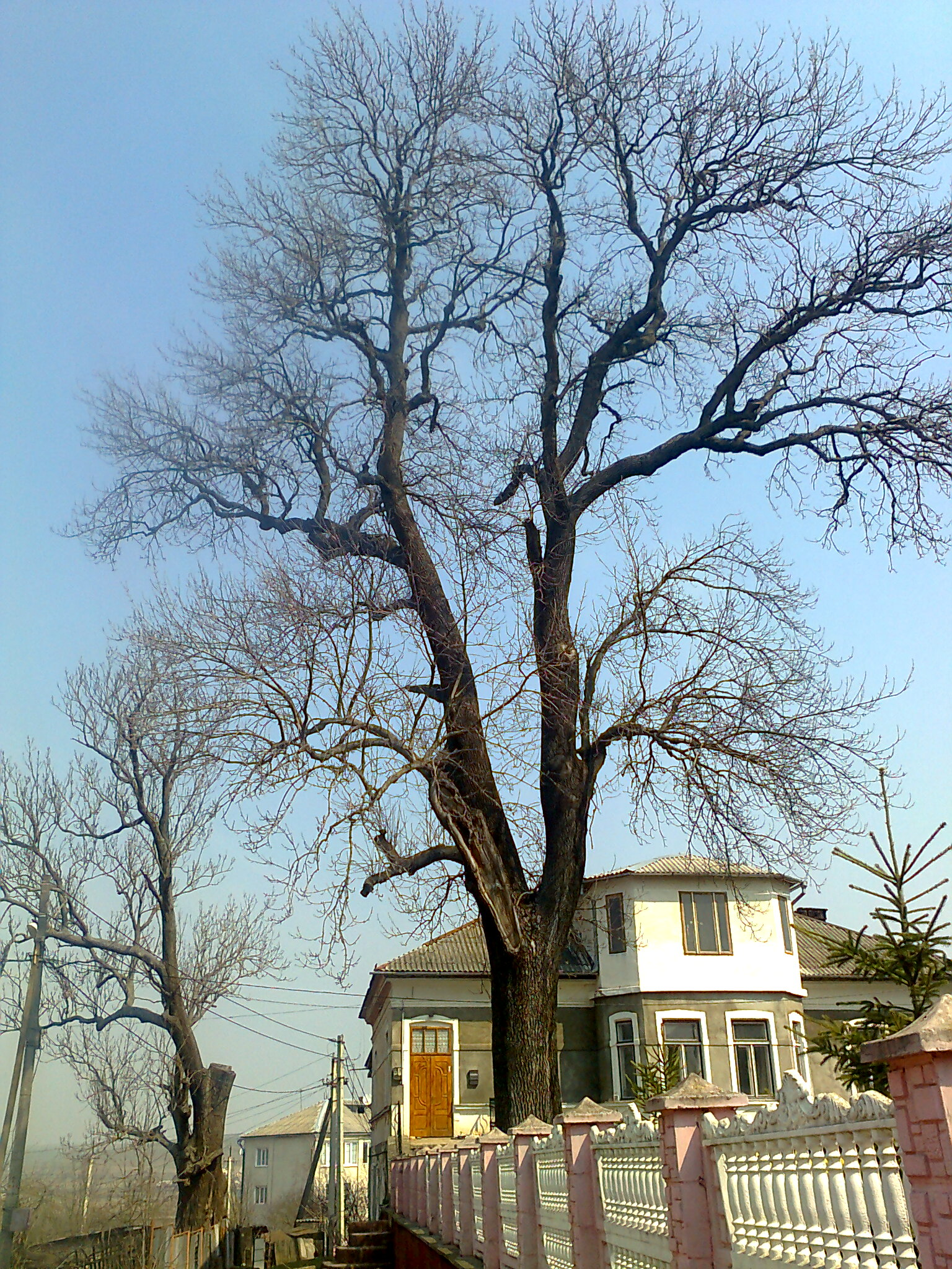 Монастириські ясени поблизу костелу